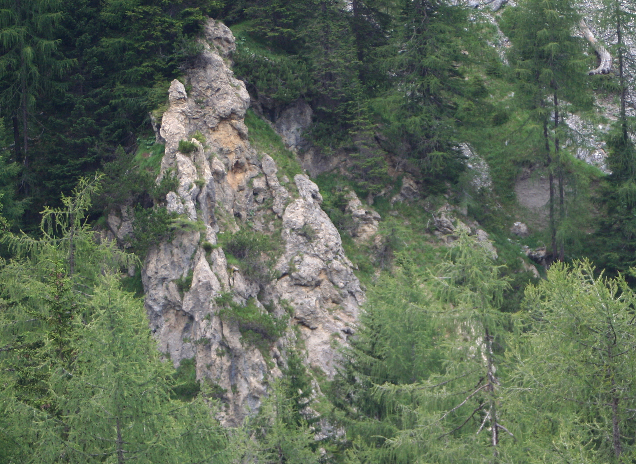 Bizarre Felsgestalten der Reichenhall-Formation im Halltal, Tirol, oberhalb der Herrenhäuser